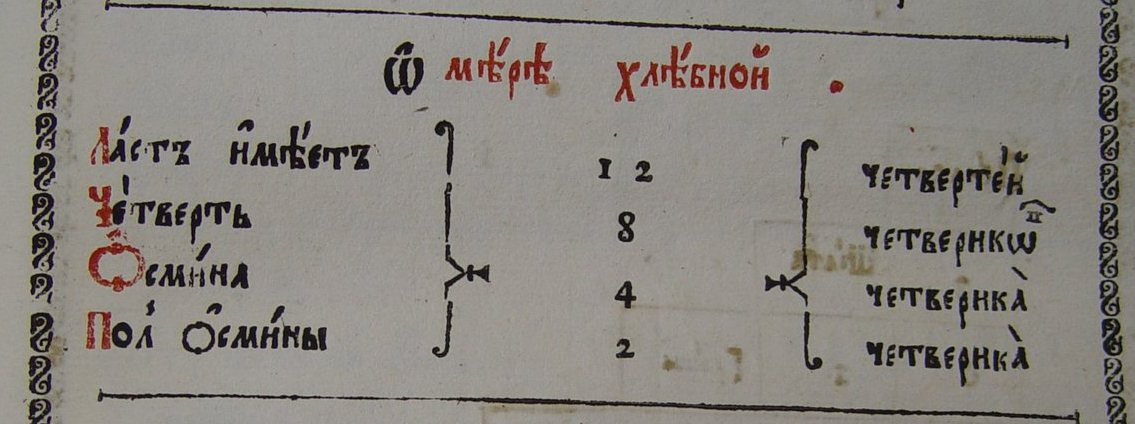 Хлебные меры по Арифметике Магницкого (Русская система мер)